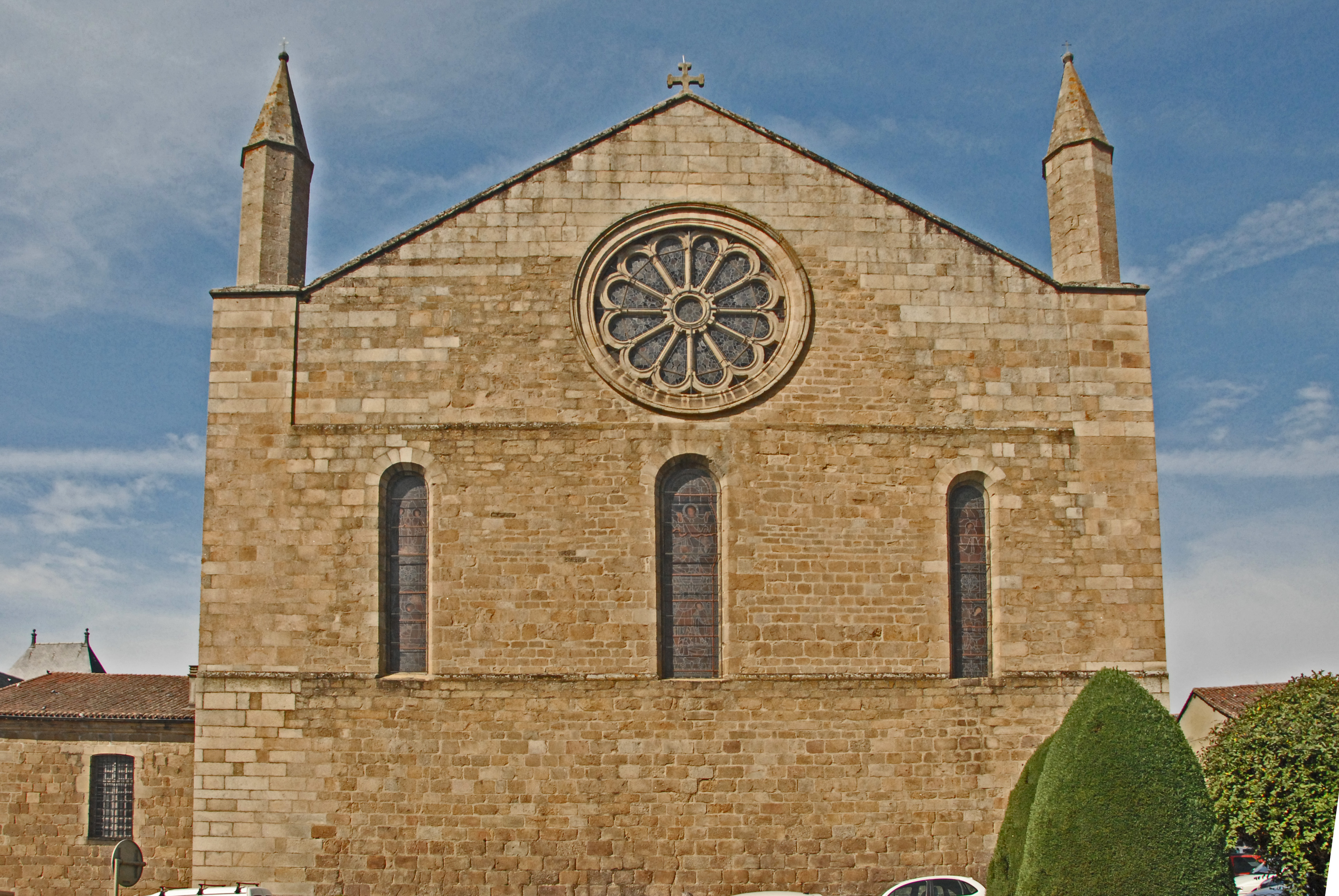 St-Junien, Chorhaupt von O